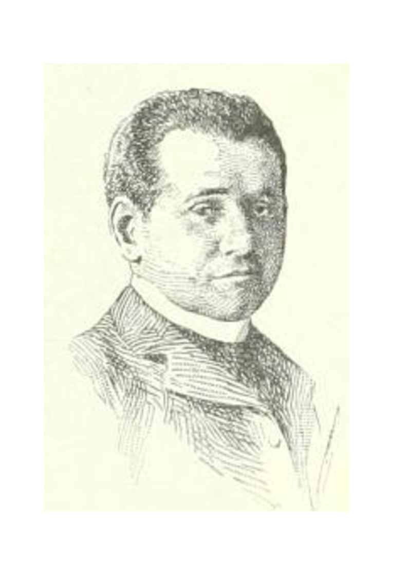 Raoul Gunsbourg